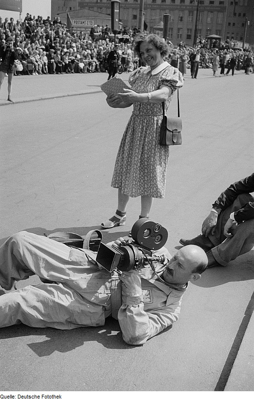 Original image description from the Deutsche Fotothek Portrait einer Frau und eines auf dem Boden liegenden Kameramanns mit einer Arriflex anläßlich der Friedensfahrt